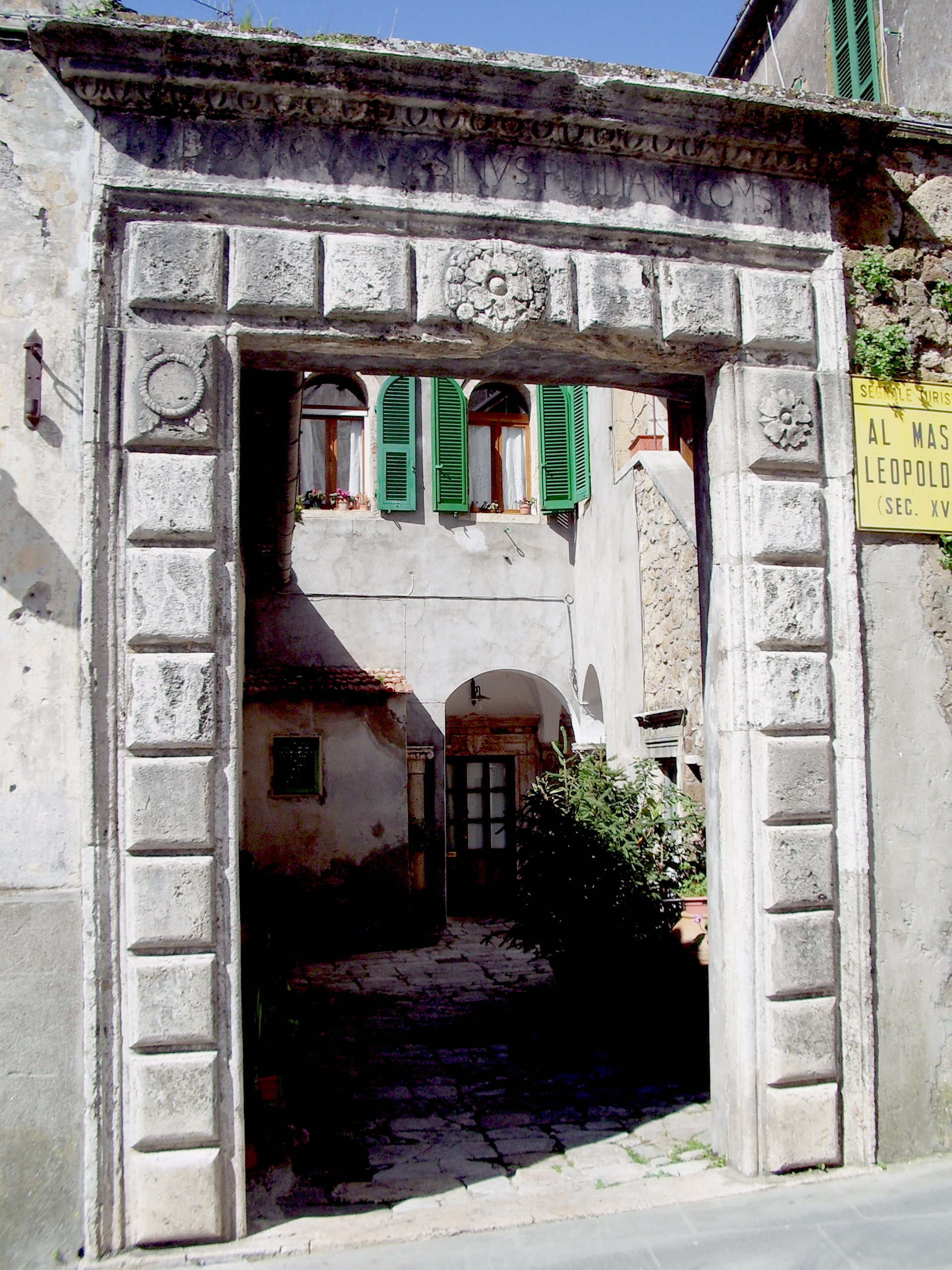 Porta esterna di accesso al cortile di Palazzo Orsini (Palazzo Comitale) di Sorano